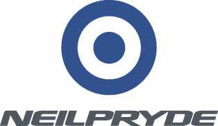 Orginal Logo, das bis heute das gleiche ist